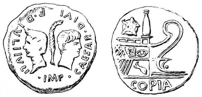 Légende du livre : Avers : têtes adossées de Jules César et d'Octave (régulièrement Octavien) séparées par une palme : CAESAR · DIVI · Filius · IVLI · IMPerator. Revers : proue de navire que surmontent au-dessus du bordage : 1° en avant, un objet désigné improprement sous le nom d'obélisque dont il n'a nullement la forme, mais qui ressemble absolument à la massue d'Hercule telle qu'elle est figurée sur la monnaie des Ségusiaves ; 2° plus en arrière, un autre objet qualifié globe radié, mais qui est en réalité un dodécaèdre avec angles saillants. A l'exergue COPIA surnom romain de Lugdunum. On remarque sur les flancs du navire, outre les rames et des détails de construction, un dauphin à la partie inférieure et au-dessus l'œil qui figure sur la plupart des vaisseaux antiques. Figure 196, page 133 du livre d'André Steyert, Nouvelle histoire de Lyon et des provinces, de lyonnais, Forez, Beaujolais, Franc-lyonnais et Dombes, tome premier, Antiquité depuis les temps préhistoriques jusqu'à la chute du royaume burgonde (534), illustré par l'auteur de 800 dessins, cartes, plans, etc. Lyon, Bernoux et Cumin, 1895.